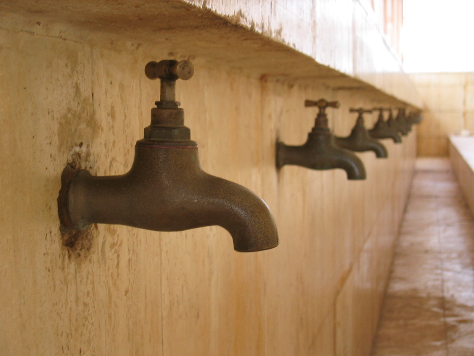 Touba, Senegal, Moschee